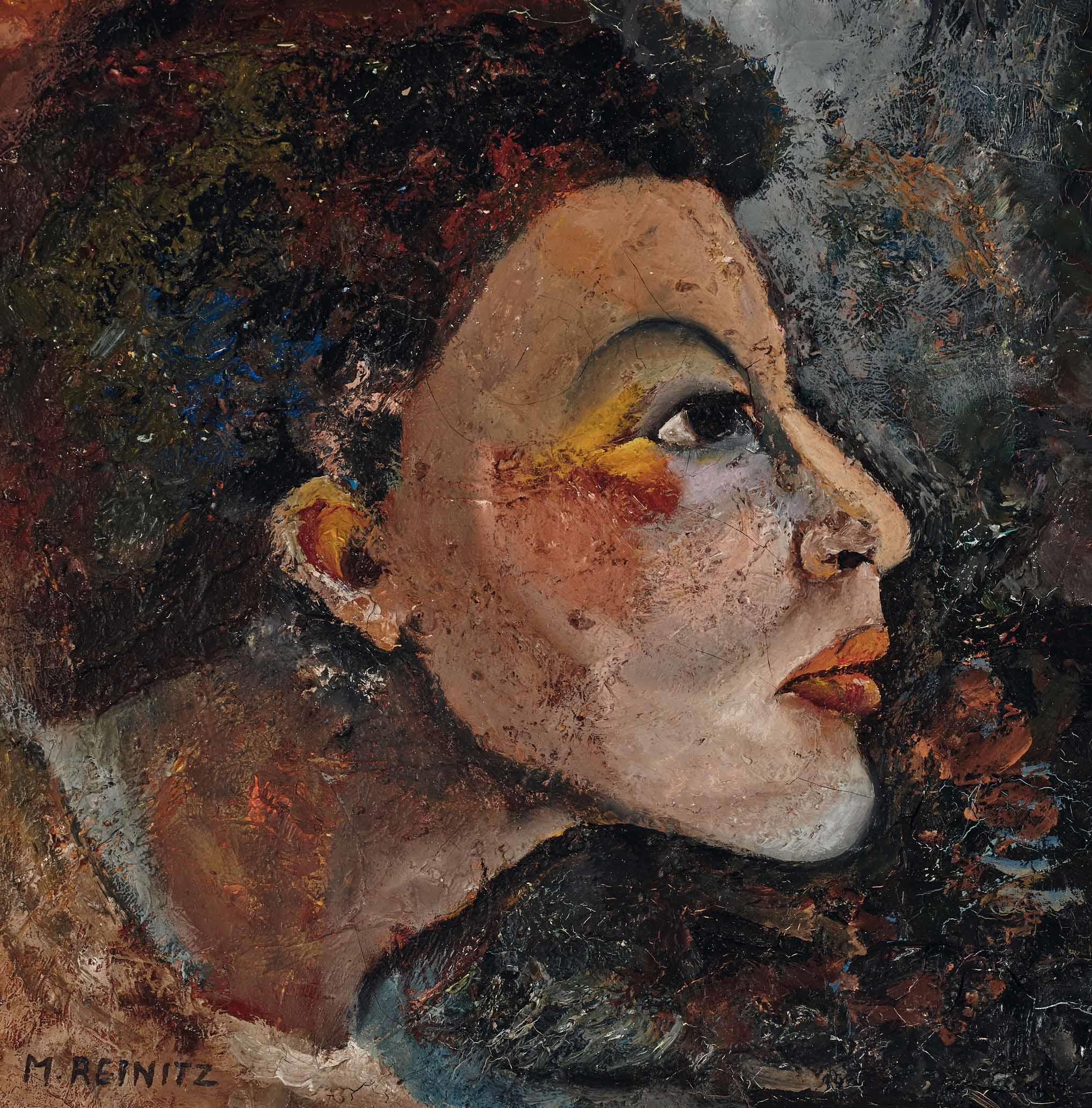 Damenporträt